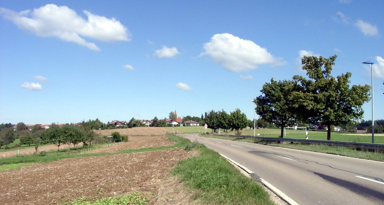 Lichtenwald, Blick auf Thomashardt